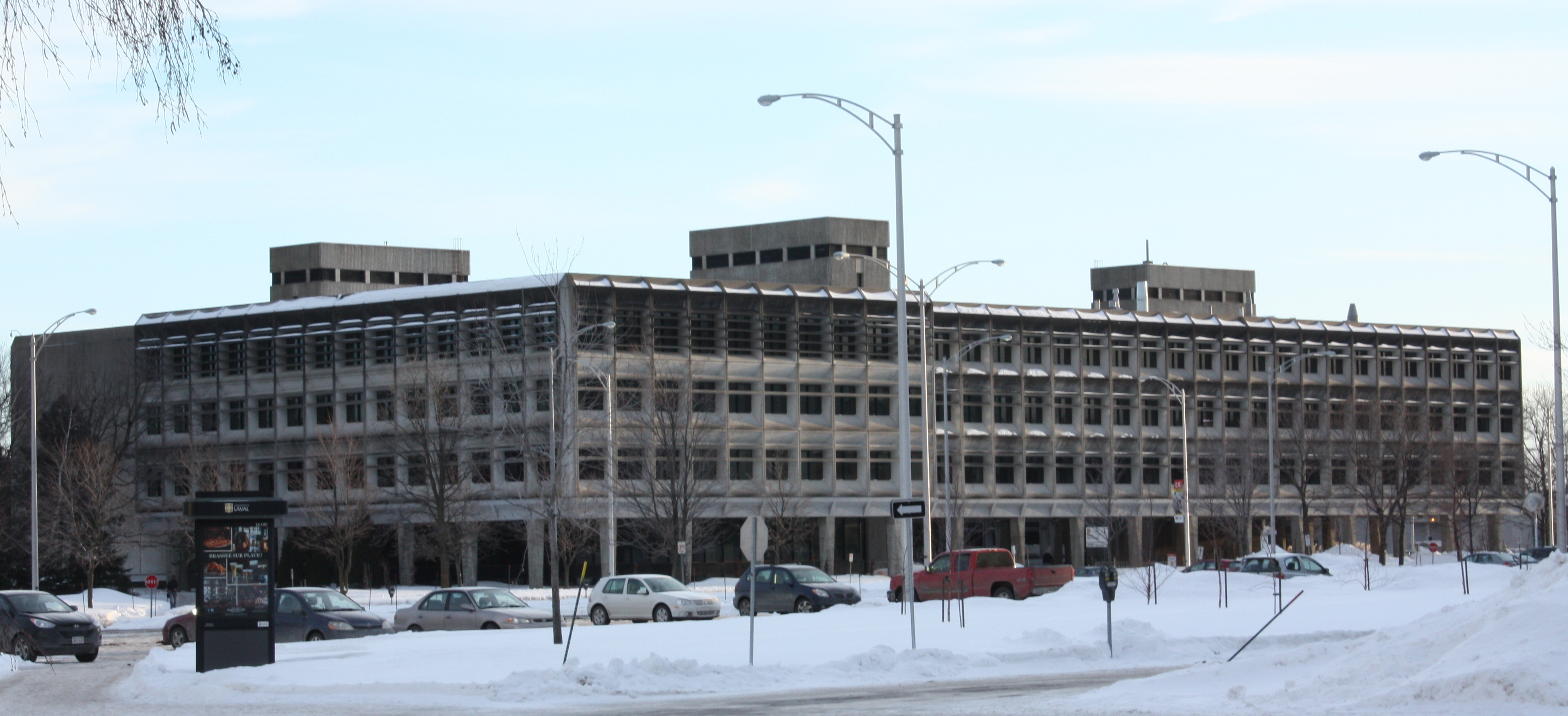 Pavillon Paul-Comtois de l'Université Laval.